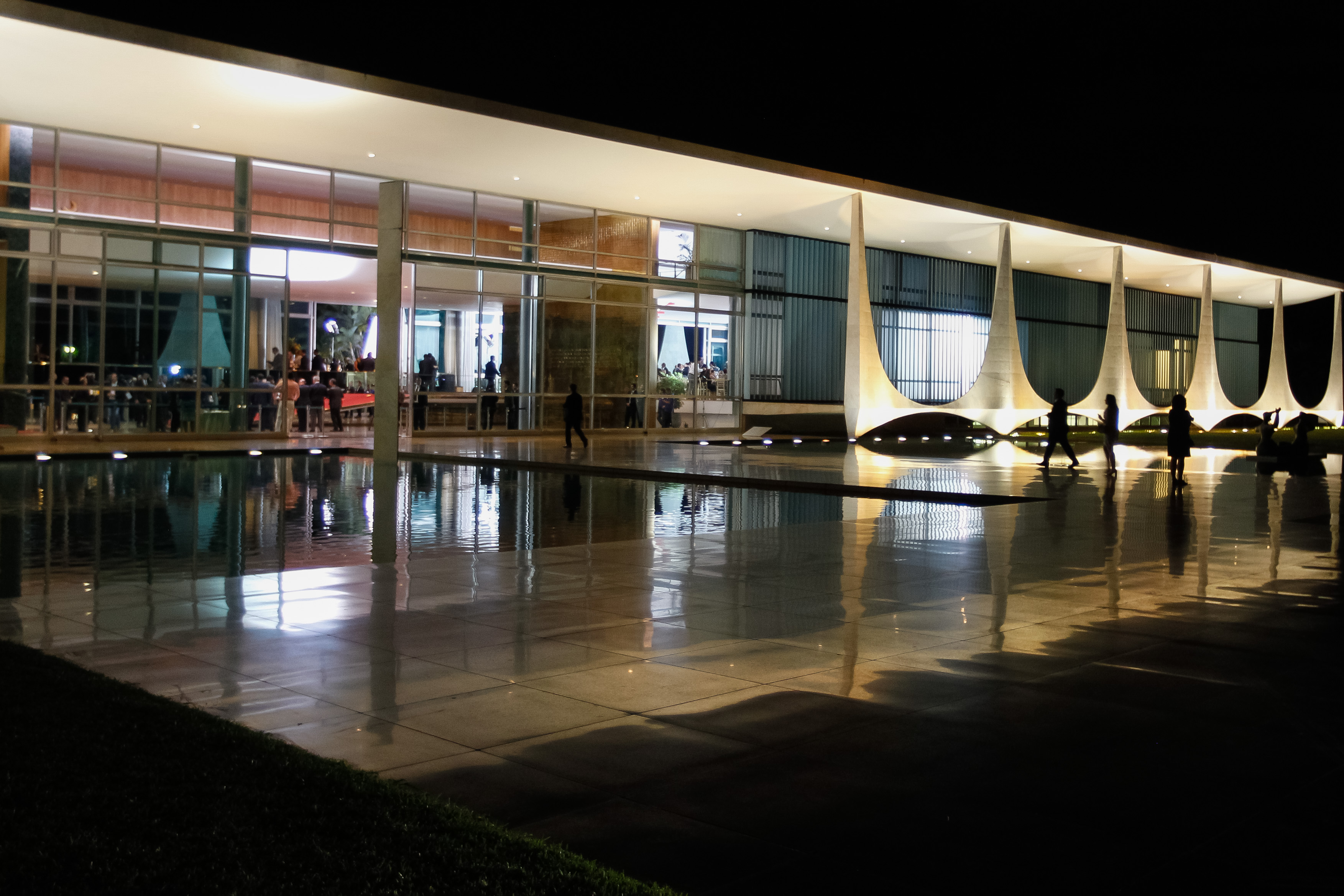 Brasília - DF 09/10/2016. Presidente Michel Temer e a senhora Marcela Temer recebem convidados para o jantar com a base aliada no Palácio da Alvorada. Foto: Beto Barata/PR